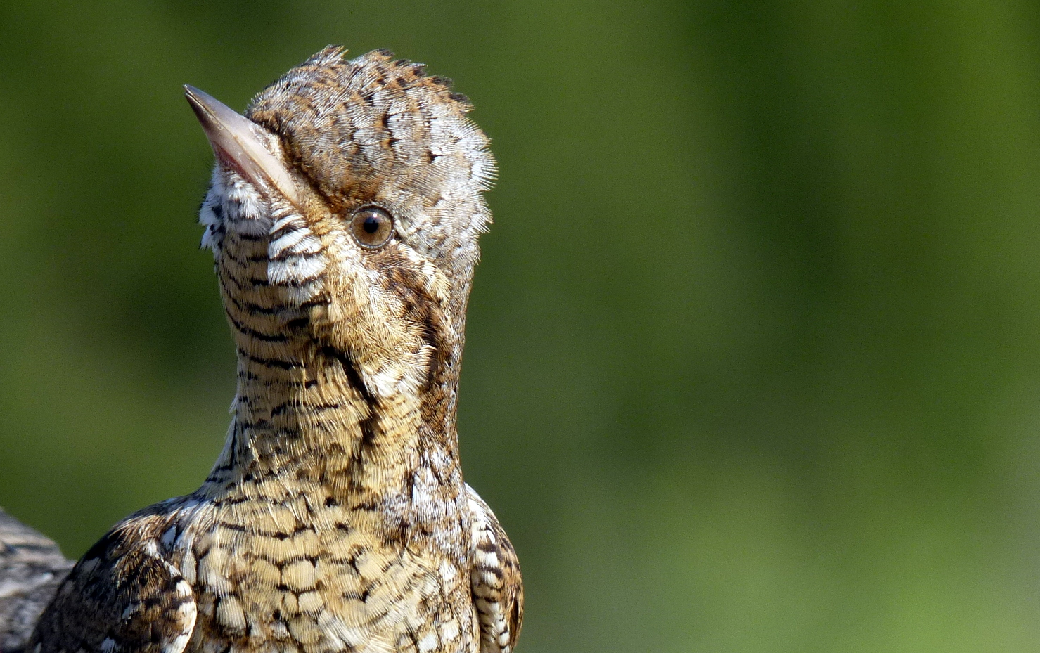 Colltort/Formiguer anellat a la Marjal de Rafalell i Vistabella (València)